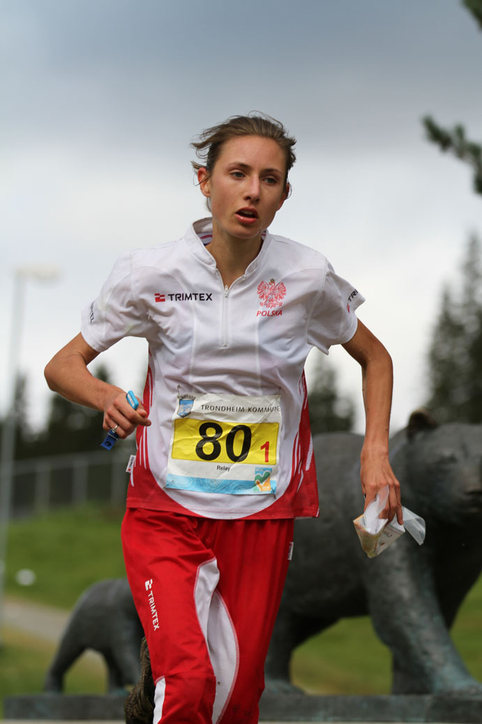 Relay at WOC2010